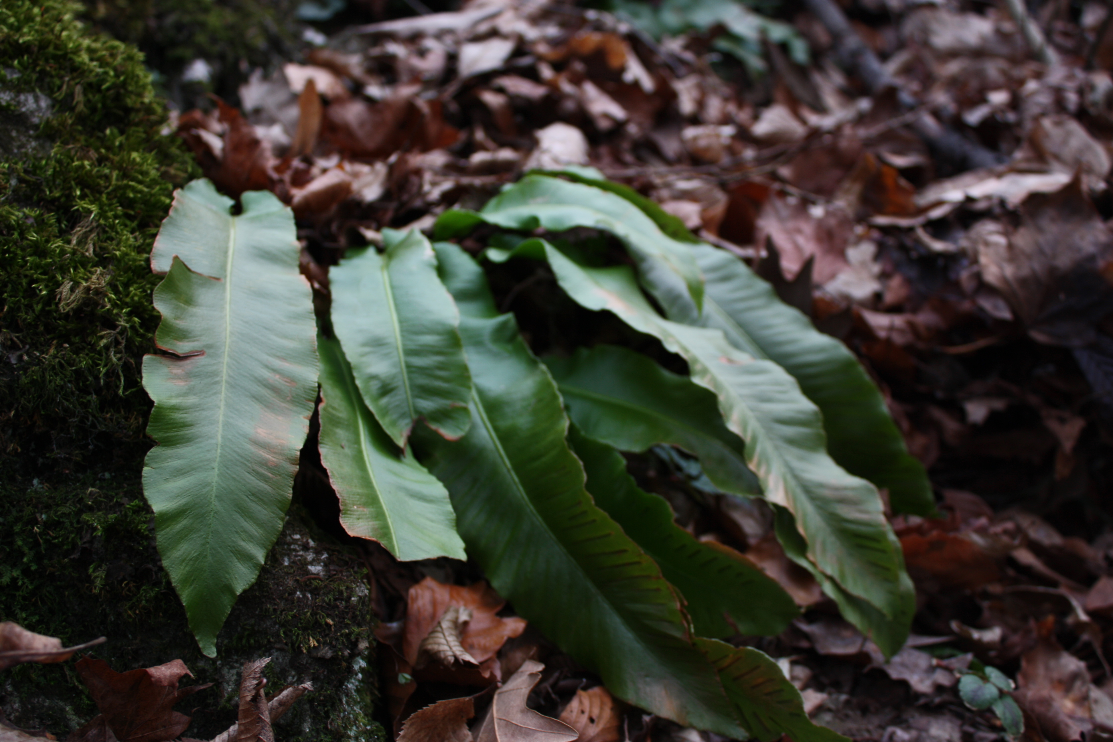 jazyk jelení